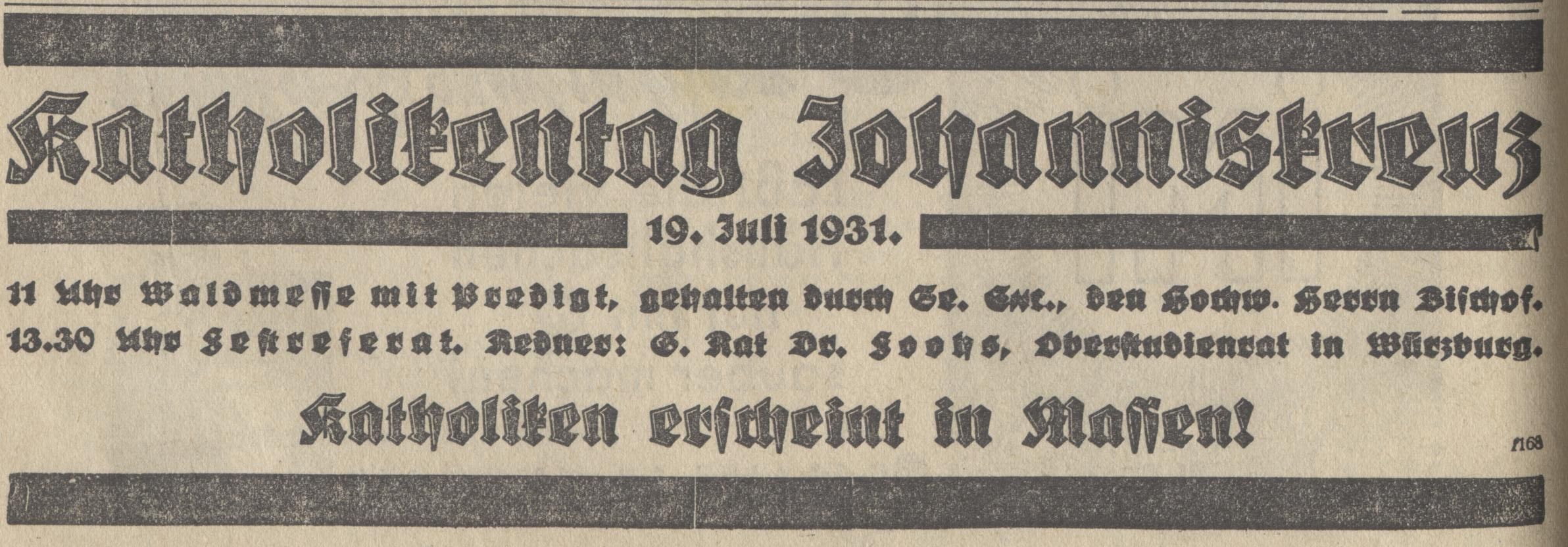 Anton Fooß, Anzeige Katholikentag 1931